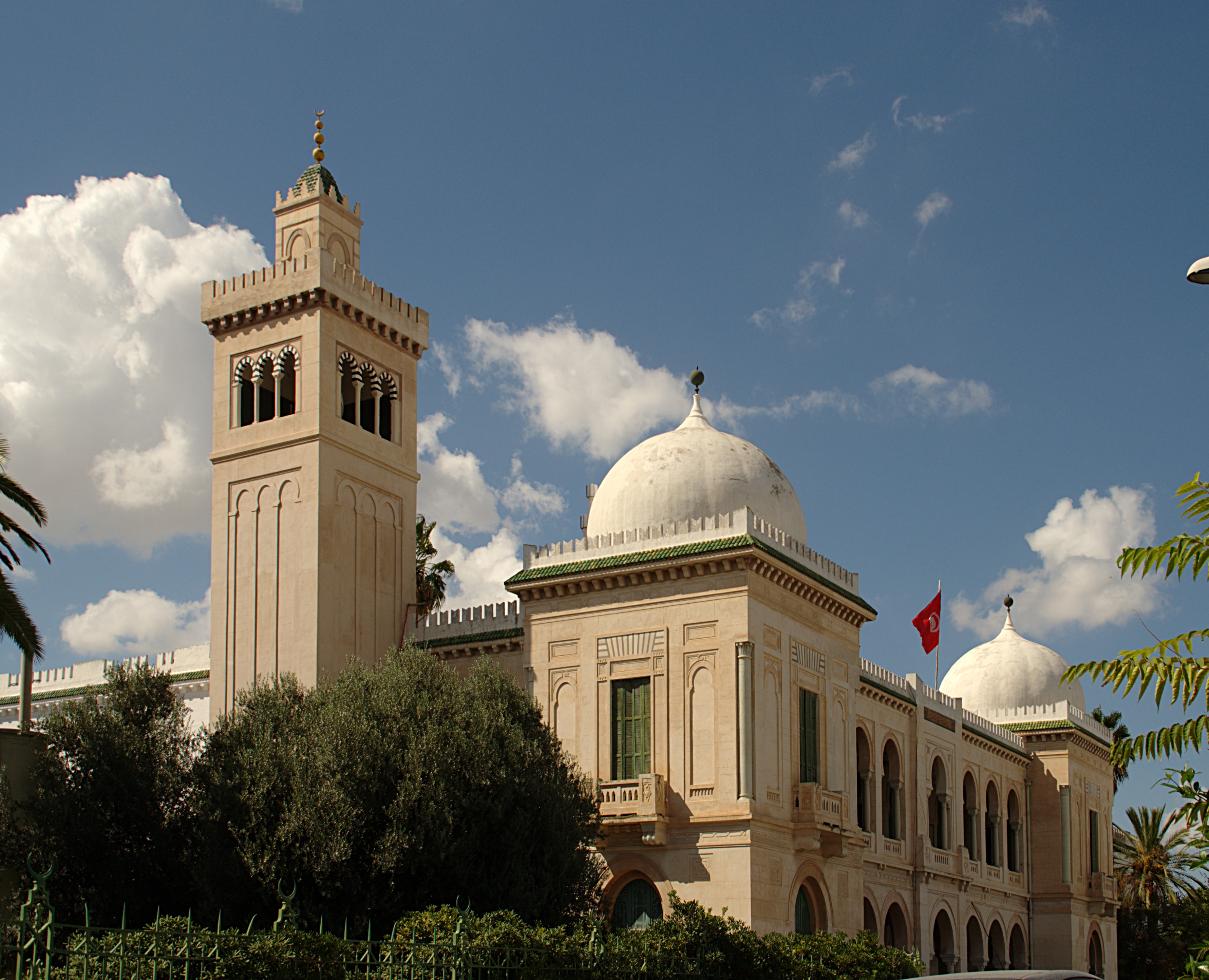 Collège Sadiki, Tunis